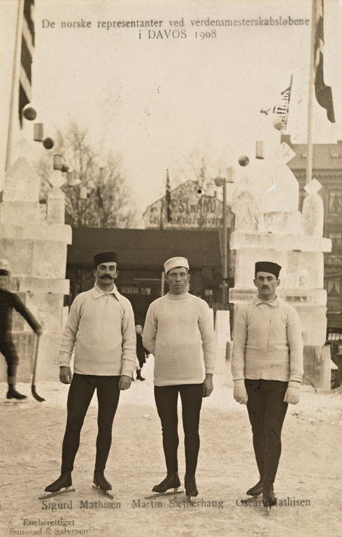 De norske representanter ved verdensmesterskabsløbene i Davos 1908